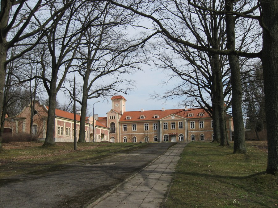 Dobrocin, pałac (zabytek nr rejestr. A-47)